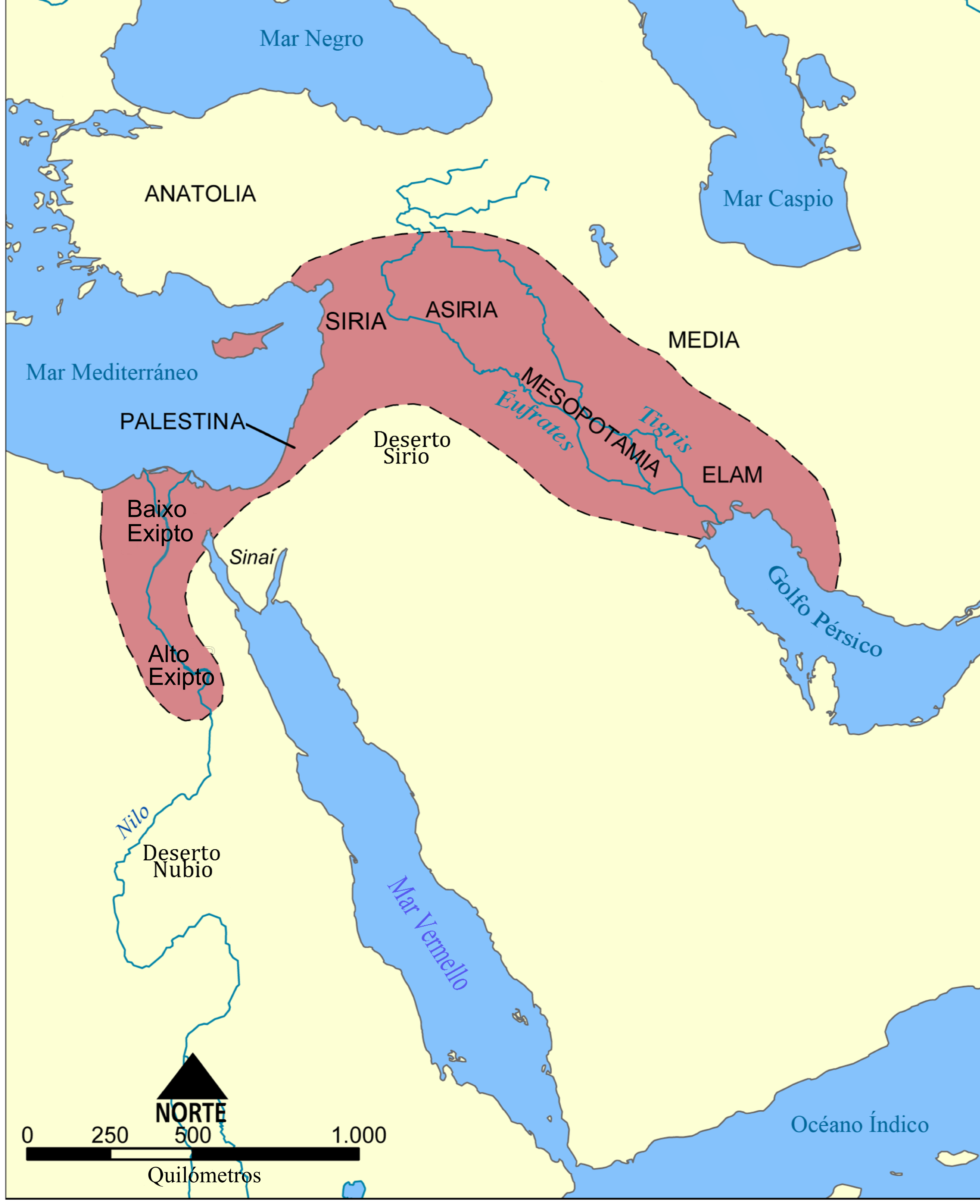 Mapa do crecente fertil.